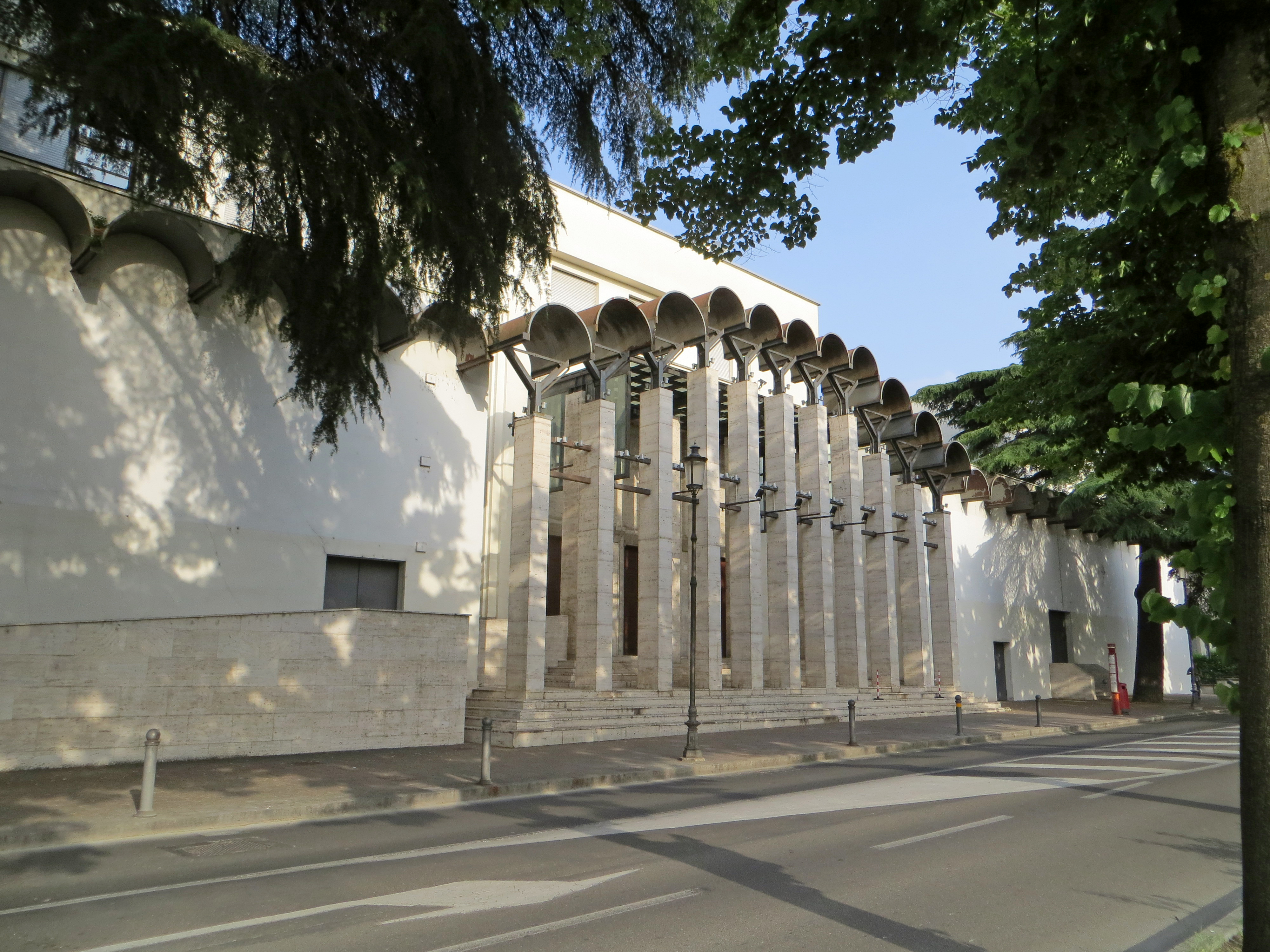 Teatro Due (Parma) - facciata